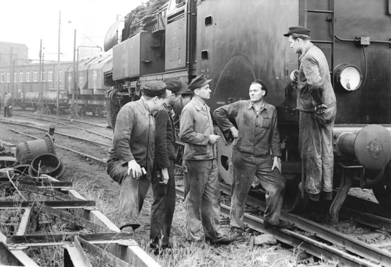 ADN-ZB-Schmidt-Voigt 31.3.1958 Vgt-Schm Leuna-Werke Die Diskussion über die Bedeutung des Gesetzes zur Vervollkommnung und Vereinfachung der Arbeit des Staatsrates ist im Gange.Die besondere Initiative der Belegschaft zur Erhöhung der Produktion drückt sich durch die Übernahme zahlreicher Verpflichtungen aus. UBz.:"Erich Seiffert mit seiner Methode gab auch uns das Beispiel. Seit dem 24.3.1958 arbeiten auch wir in der Lok- und Waggonreparaturwerkstatt nach der Seiffert-Methode. Die ersten Eintragungen im Buch über nicht notwendige Verlustzeiten gibt es schon. Der Anfang ist also gemacht," meinen v.l.n.r. Schlosser Harry Zippel,Siegfried Gottschalk,Meister Walter Schwiersch,Schlosser Heinz Bürner und Brigadier Gerhard Luge."